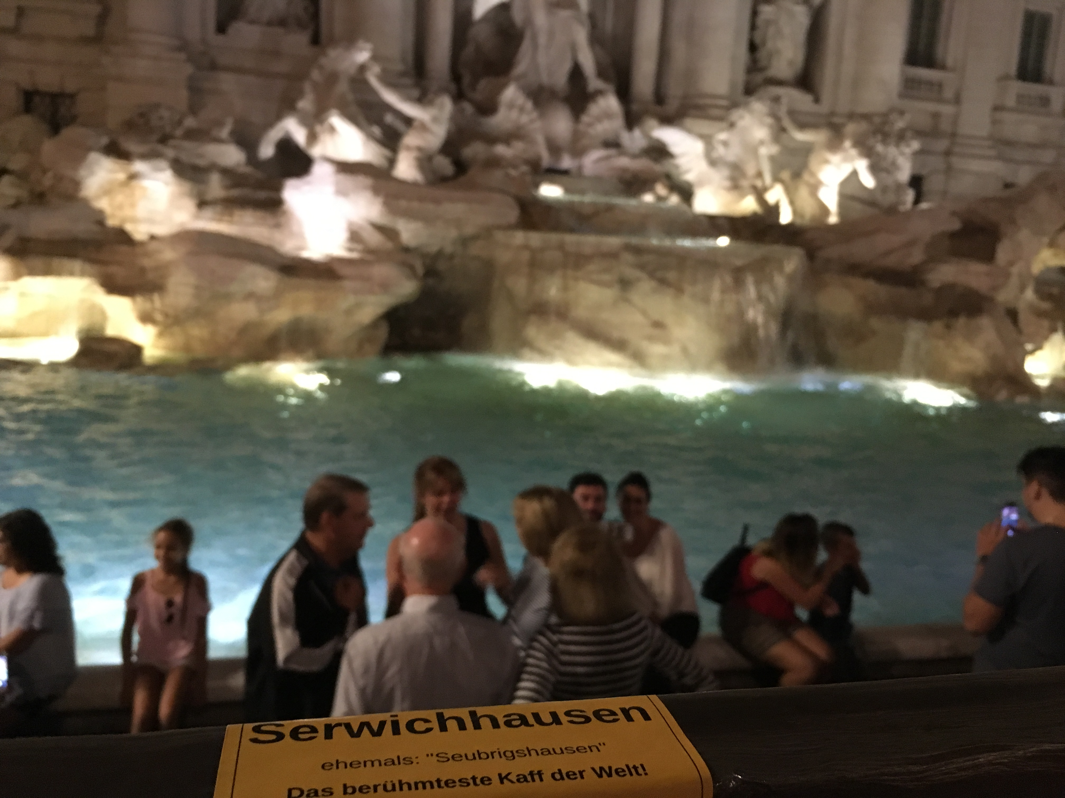 Ein Foto aus dem Jahr 2018 vom berühmten Trevi-Brunnen in Rom zeigt, dass die Sticker mittlerweile auch in der Ewigen Stadt zu finden sind.